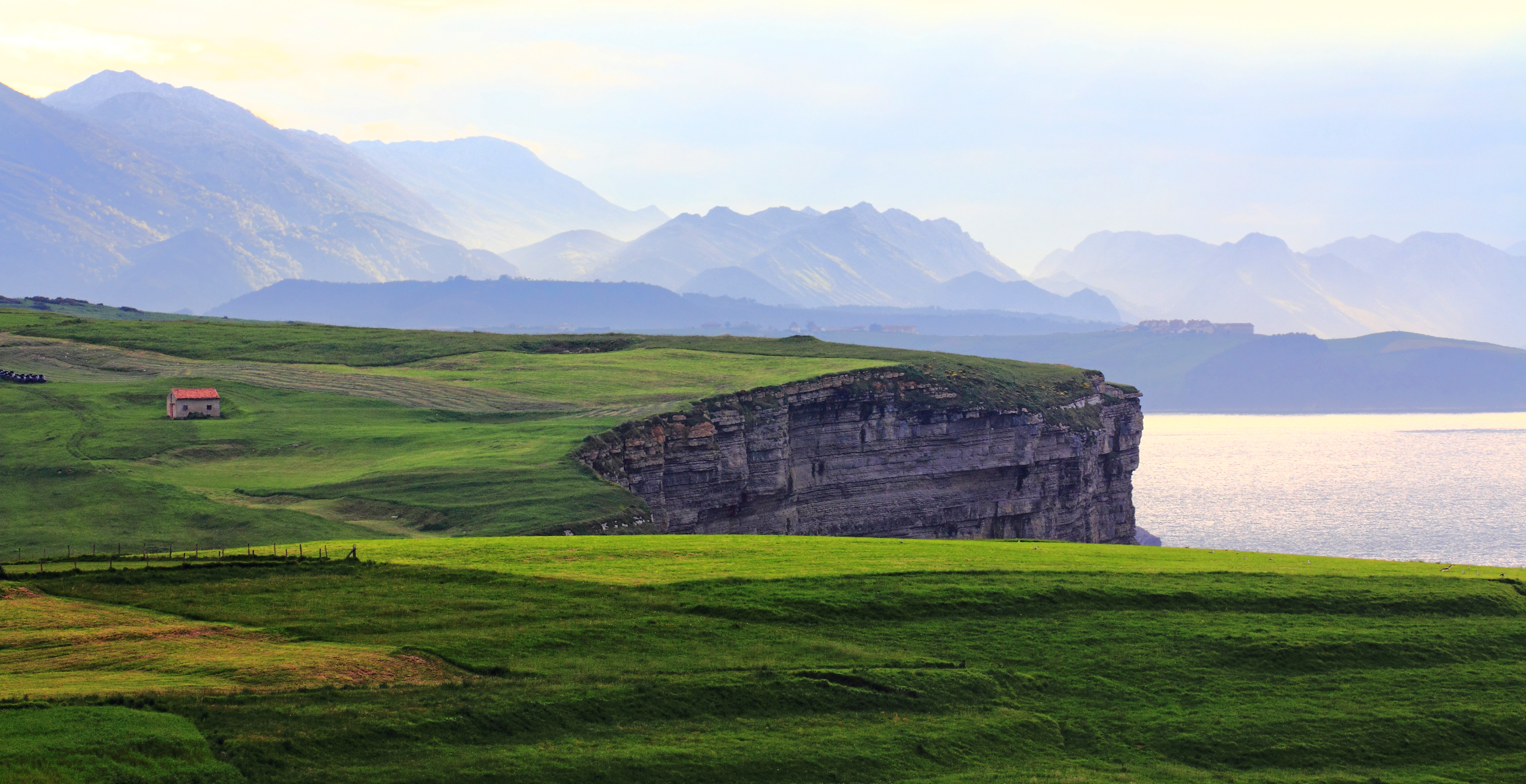 acantilados en la localidad cántabra de Toñanes, Alfoz de Lloredo